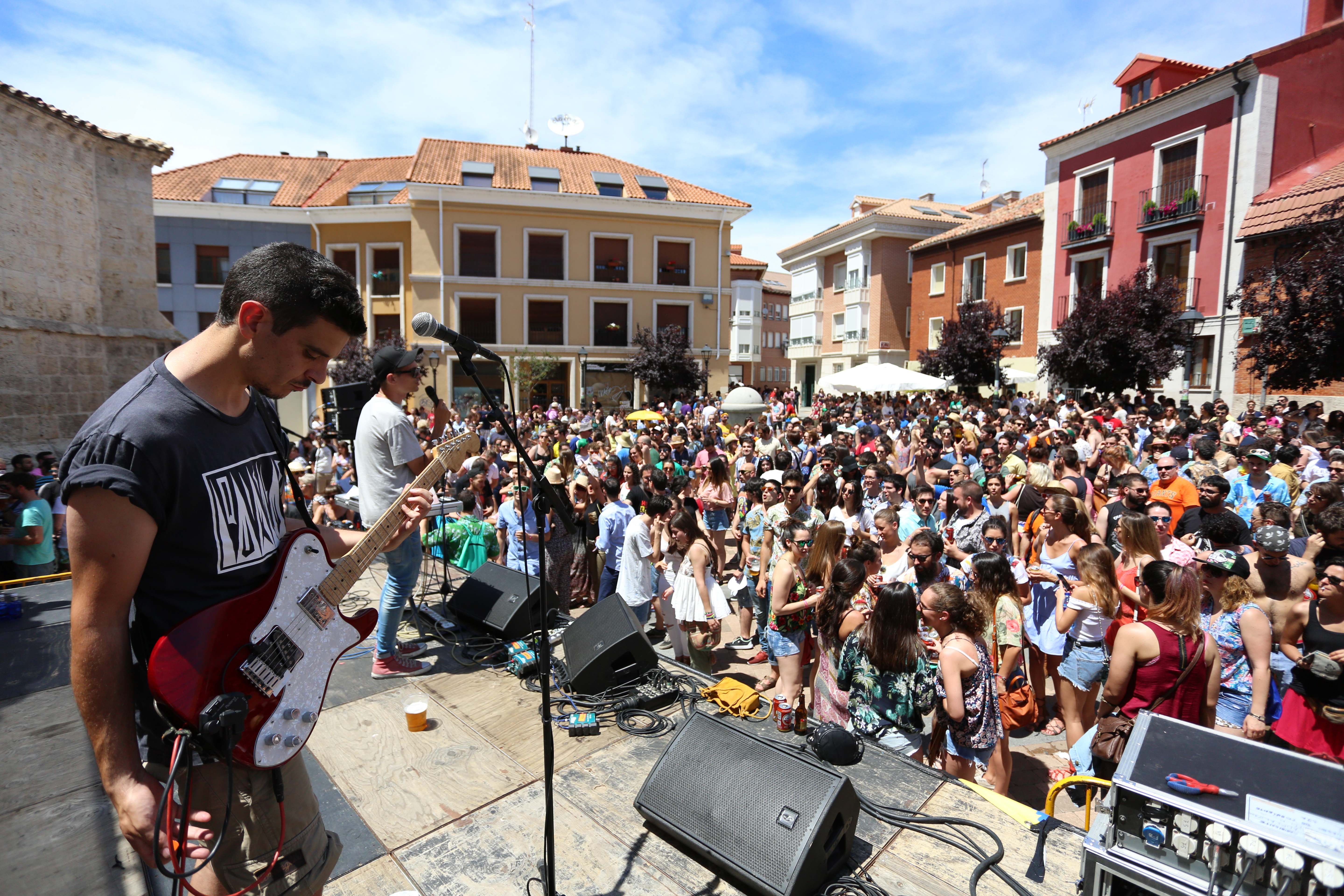 El grupo Los Ganglios en el festival Palencia Sonora 2017.